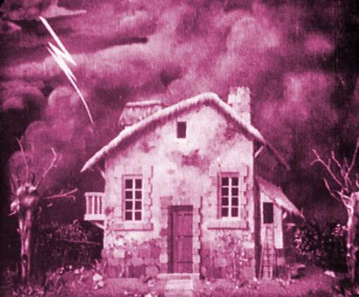 Fotogramma del cortometraggio La Maison ensorcelée (1907)